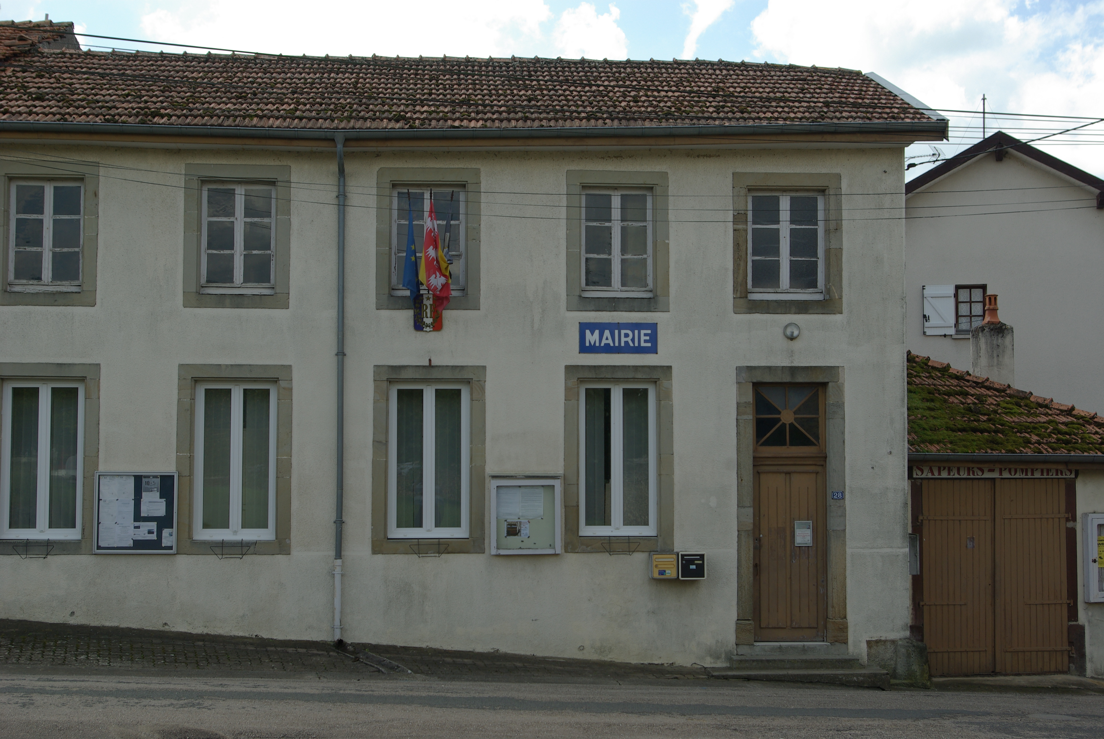 Mairie de Totainville (88)